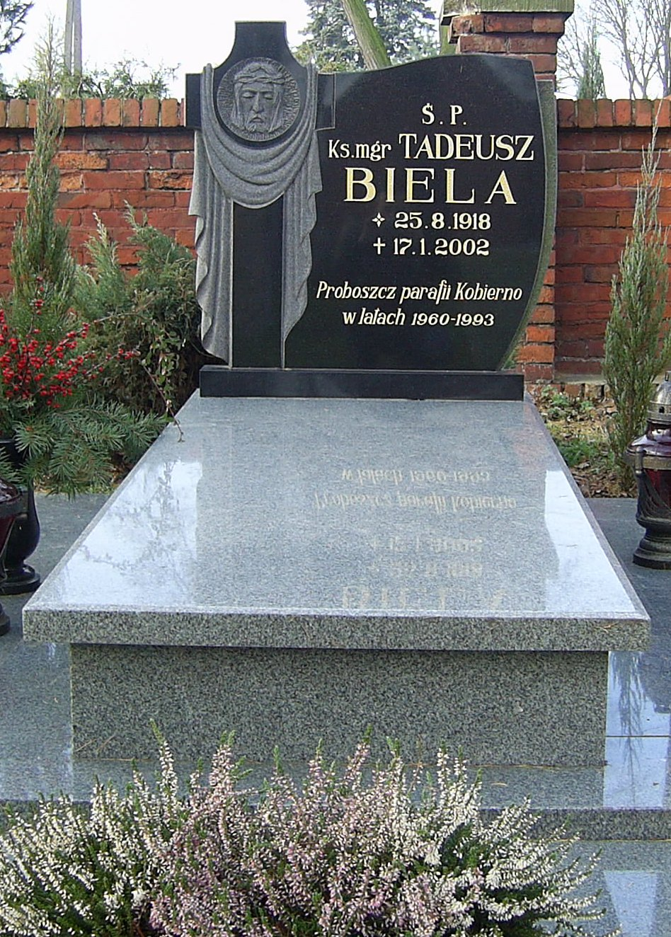 Nagrobek kapłana znajdujący się na przykościelnym cmentarzu w Kobiernie